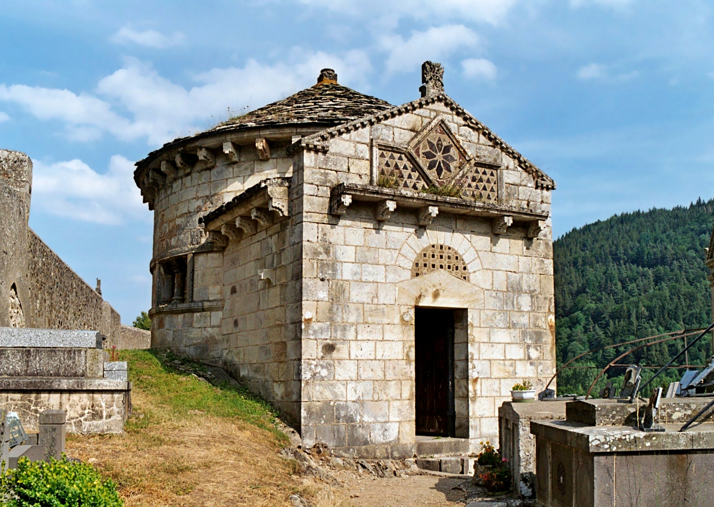 France - Auvergne - Puy-de-Dôme - Chapelle funéraire de Chambon-sur-Lac